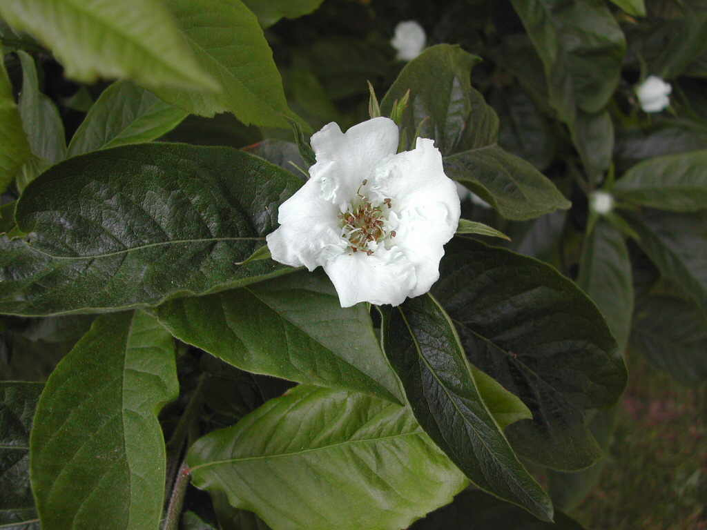 Mispel Mespilus Germanica